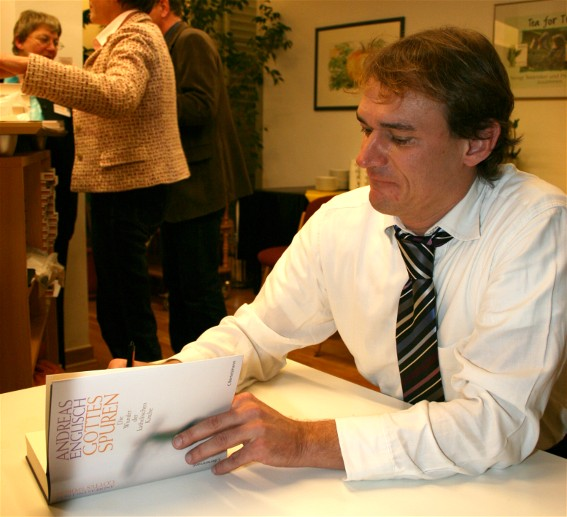 Andreas Englisch in der Kath. Landvolkshochschule Freckenhorst